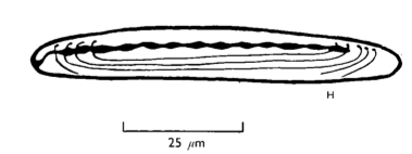 Estructura extracelular completa